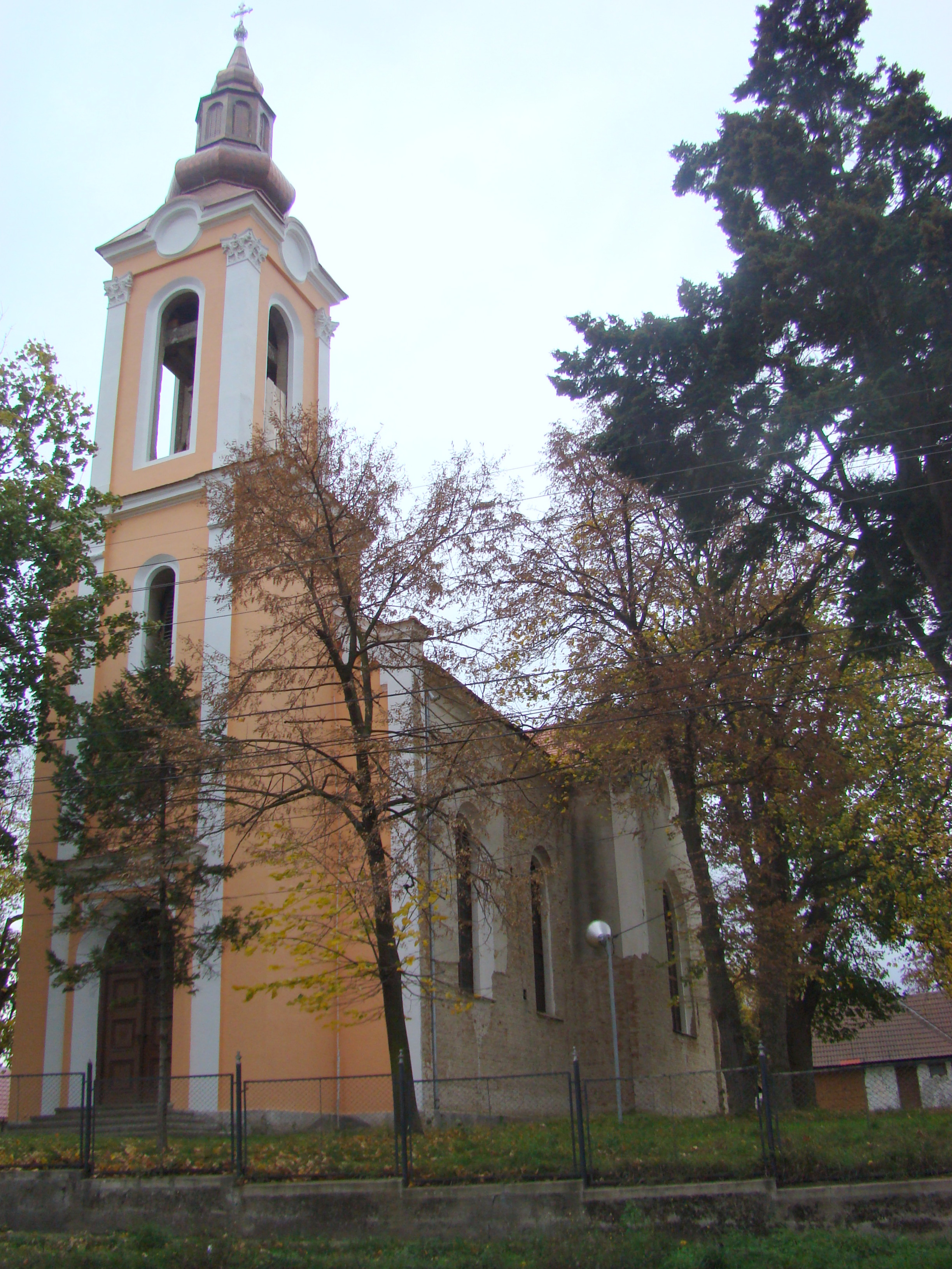 Biserica "Sf. Prooroc Ilie", oraș Miercurea Sibiului, județul Sibiu